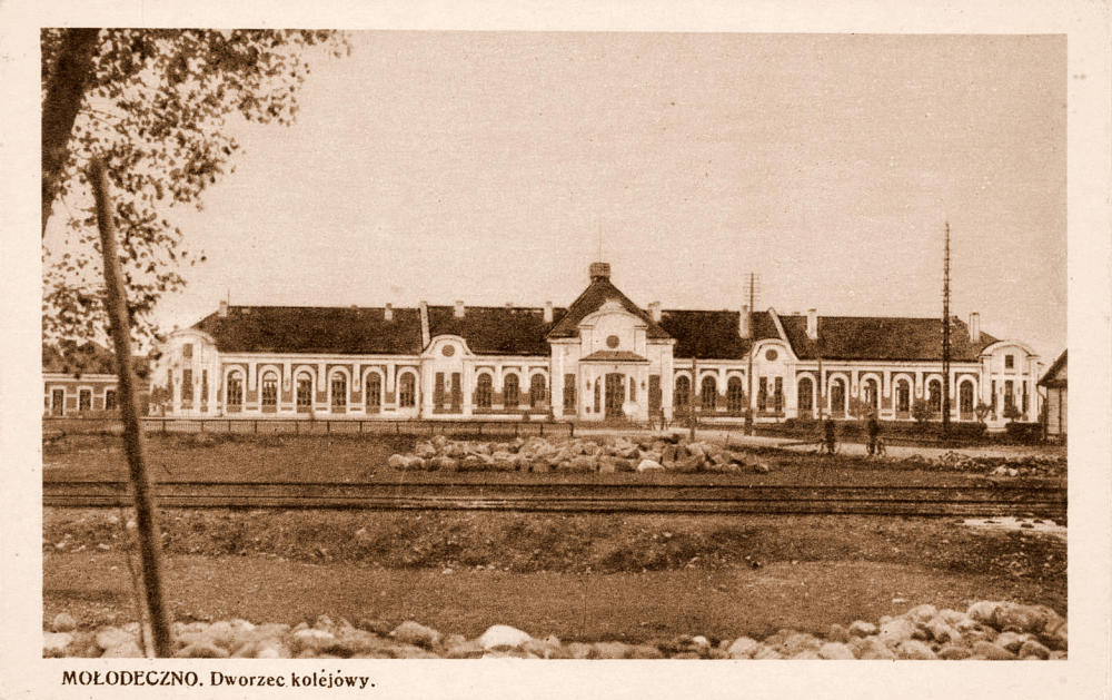 Беларуская (тарашкевіца): Чыгуначная станцыя ў Маладэчна